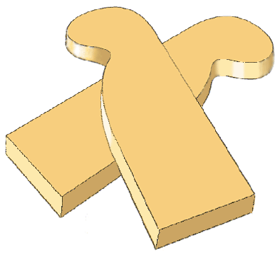 Zwei Klepperle.